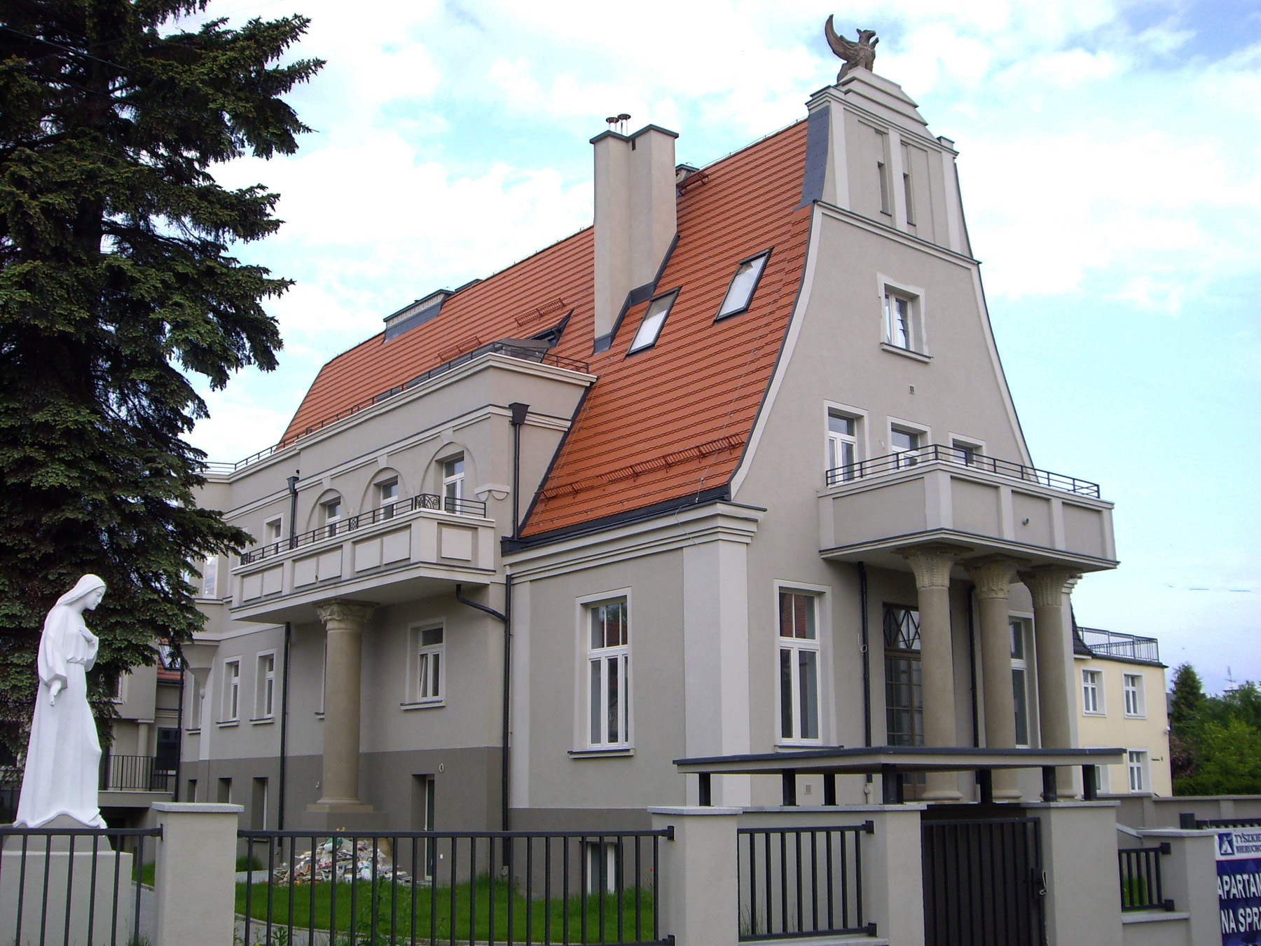 Gdynia - Willa „Gryf” wybudowana w 1927 roku jako pensjonat-sanatorium